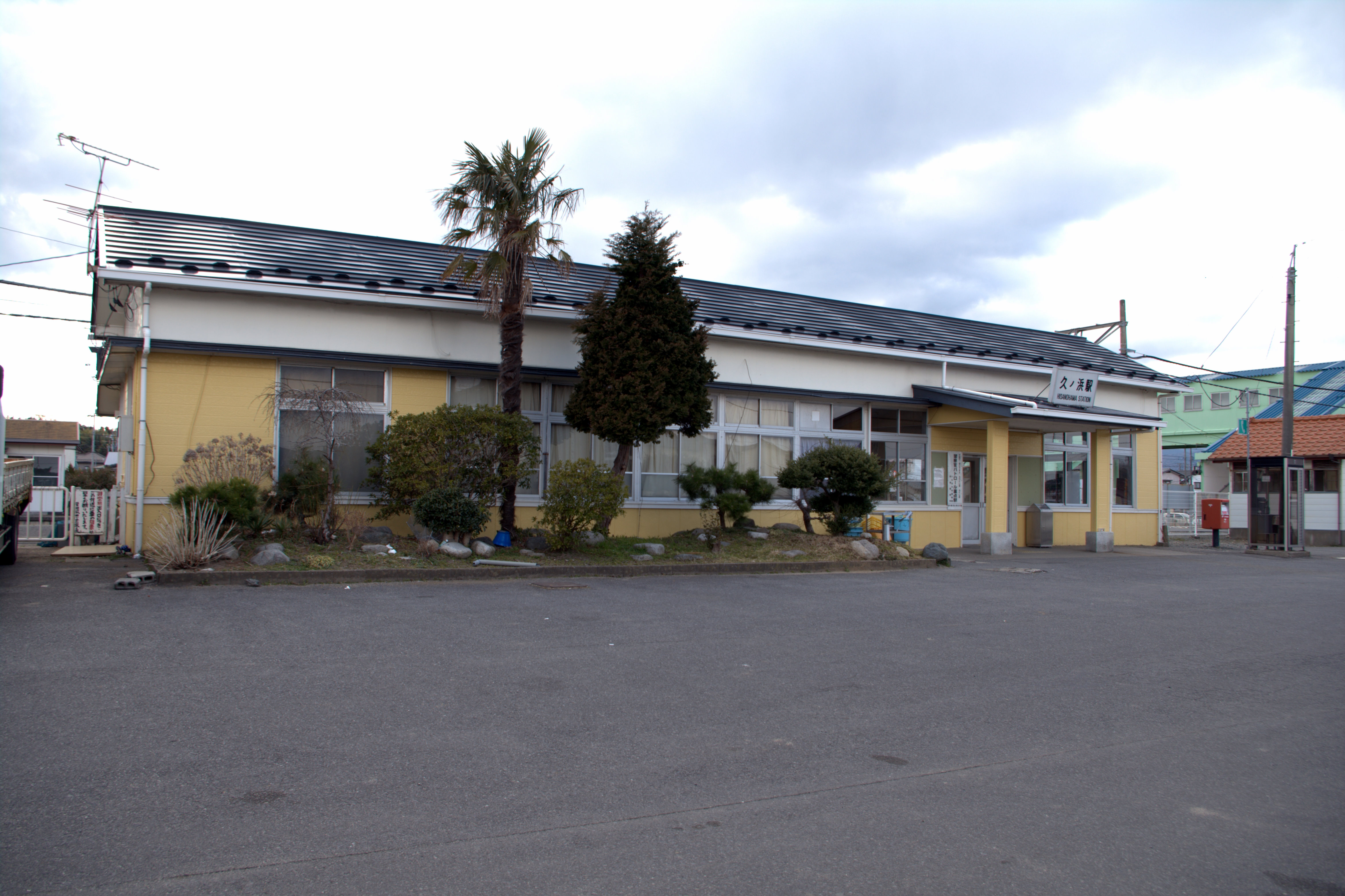 JR久ノ浜駅駅舎、2011年4月撮影